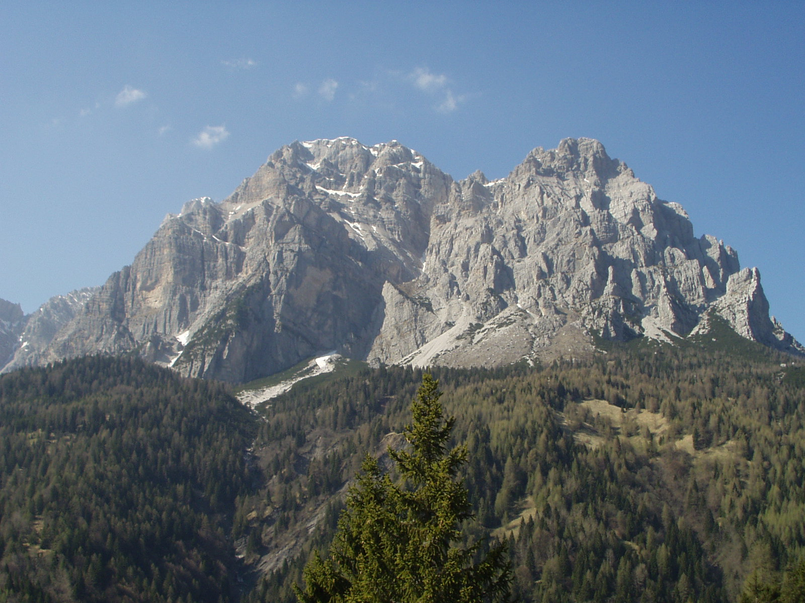 Il Moiazza visto da sud